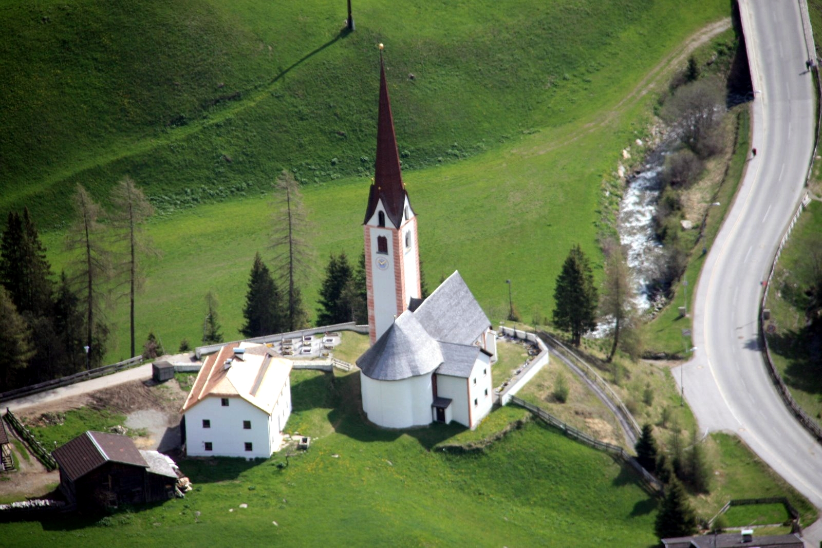 Kirche von St.Sigmund im Sellrain, links davon Widum und Widumsstadel